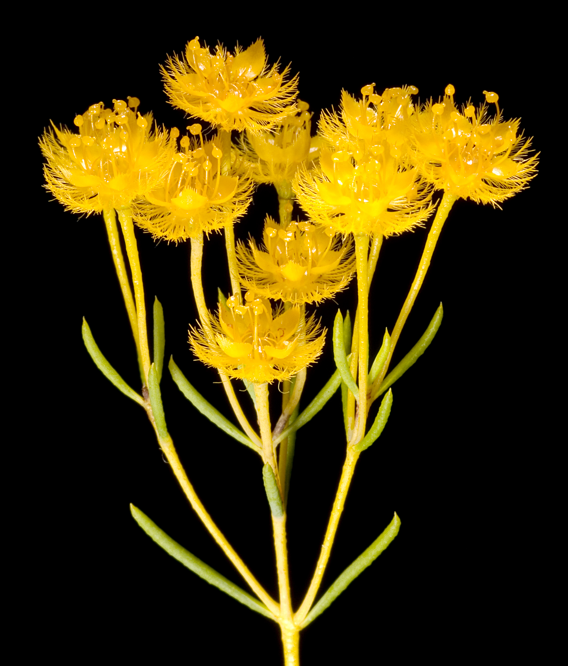 KRT3455